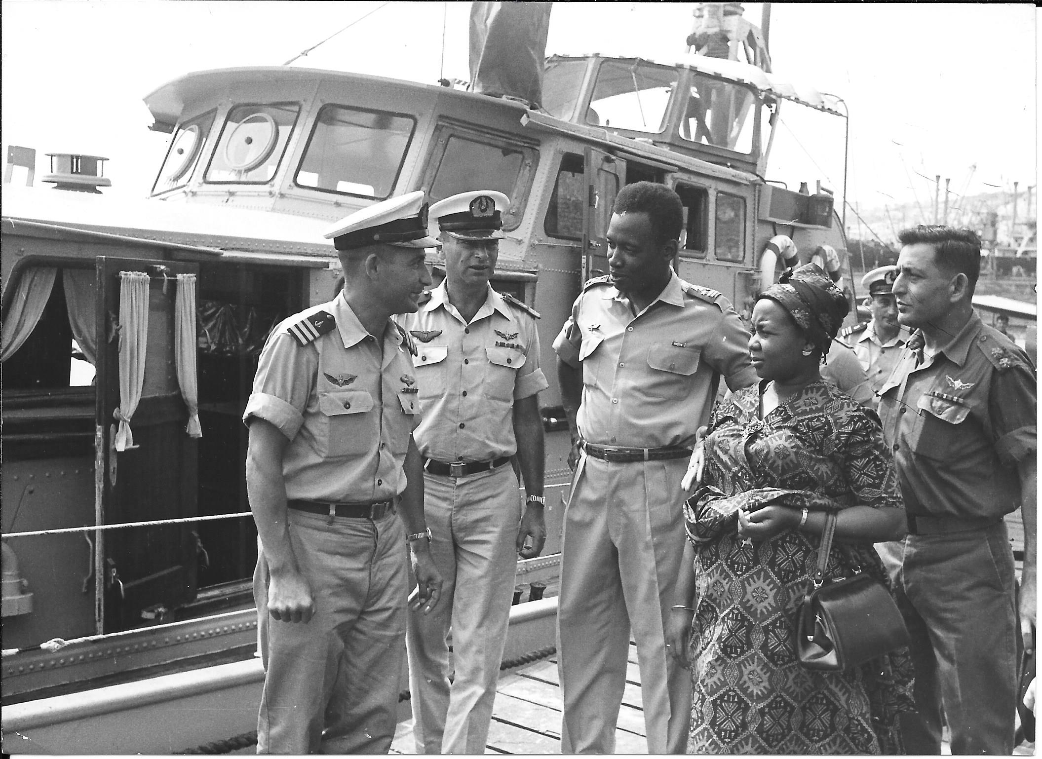 מפקד חיל הים יוחאי בן נון ואל"מ הדר קמחי מלווים אורח מאפריקה1960